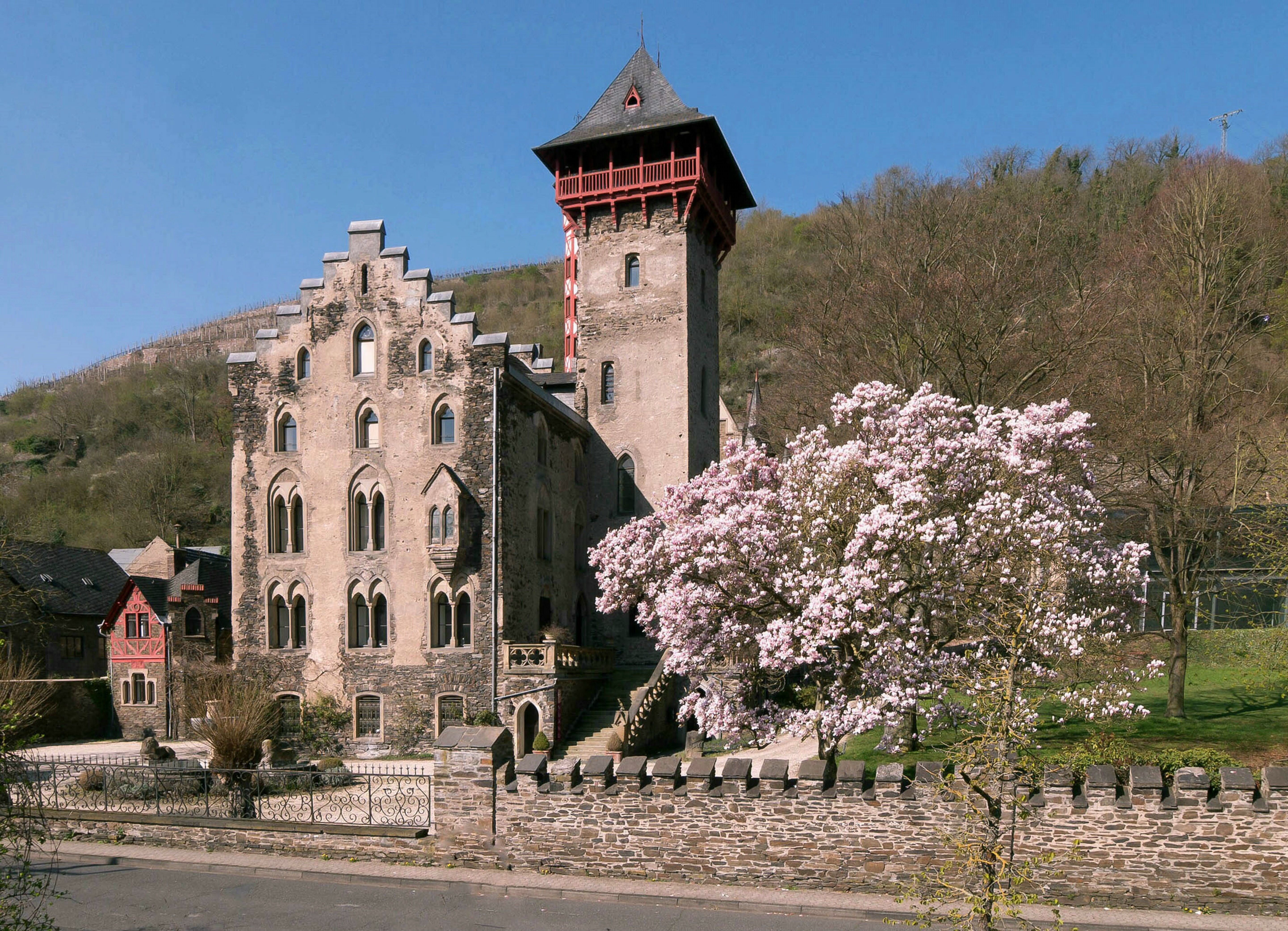 Schloss Liebieg, Magnolienbaum